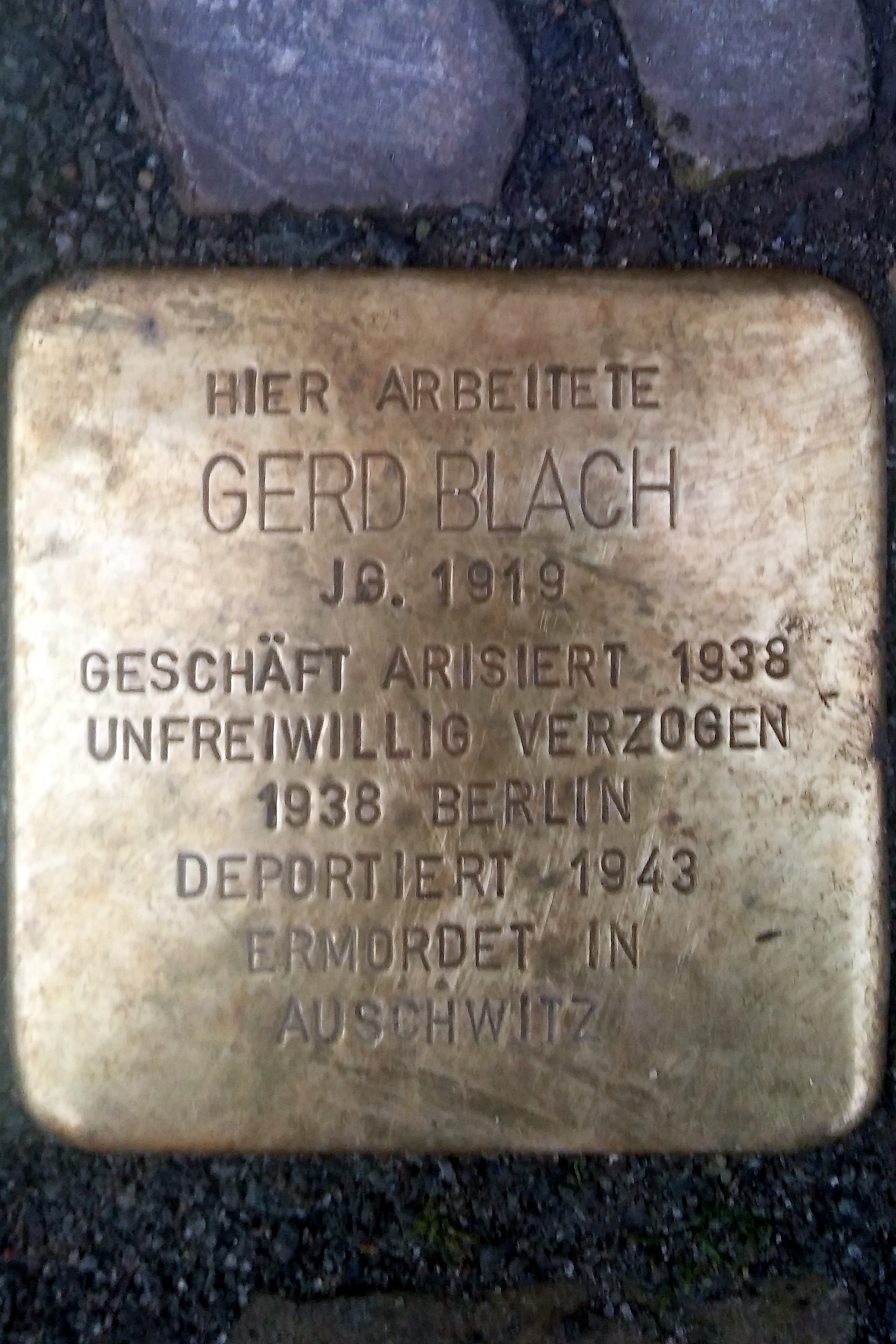 Stolperstein Gerd Blach, Stralsund Gerd Blach war der Sohn von Carl-Philipp Blach und Bruder von Friedrich Blach und Hans Blach. Der Stolperstein wurde am 9. November 2017 verlegt.